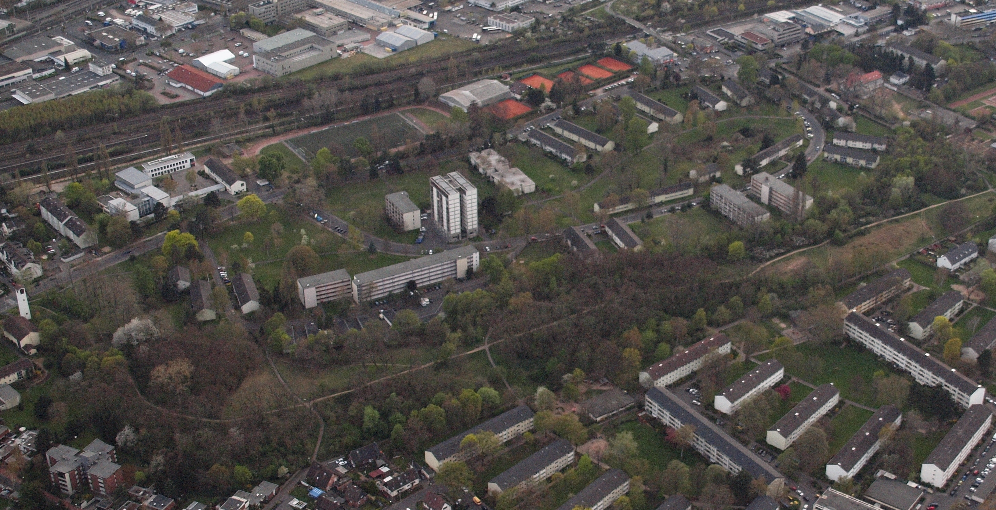 HICOG-Siedlung Tannenbusch und Düne Tannenbusch